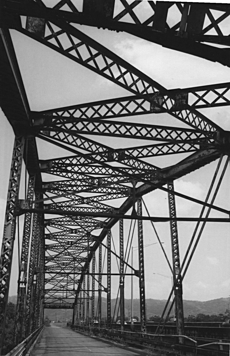 Puente Salcedo de Añasco (Old bridge over the Rio Grande de Añasco, Puerto Rico).